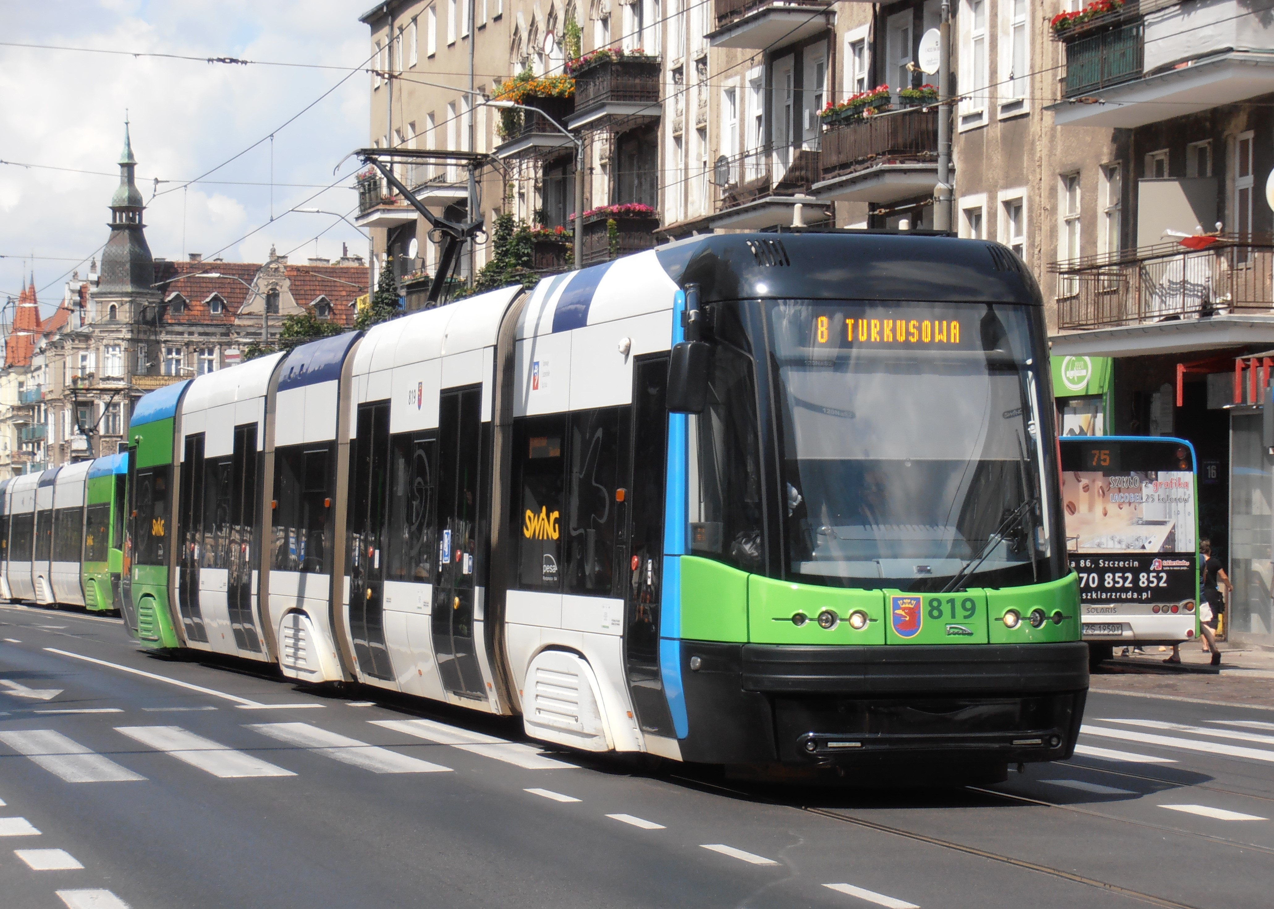 Tramwaj typu Pesa Swing na ul. Krzywoustego w Szczecinie.